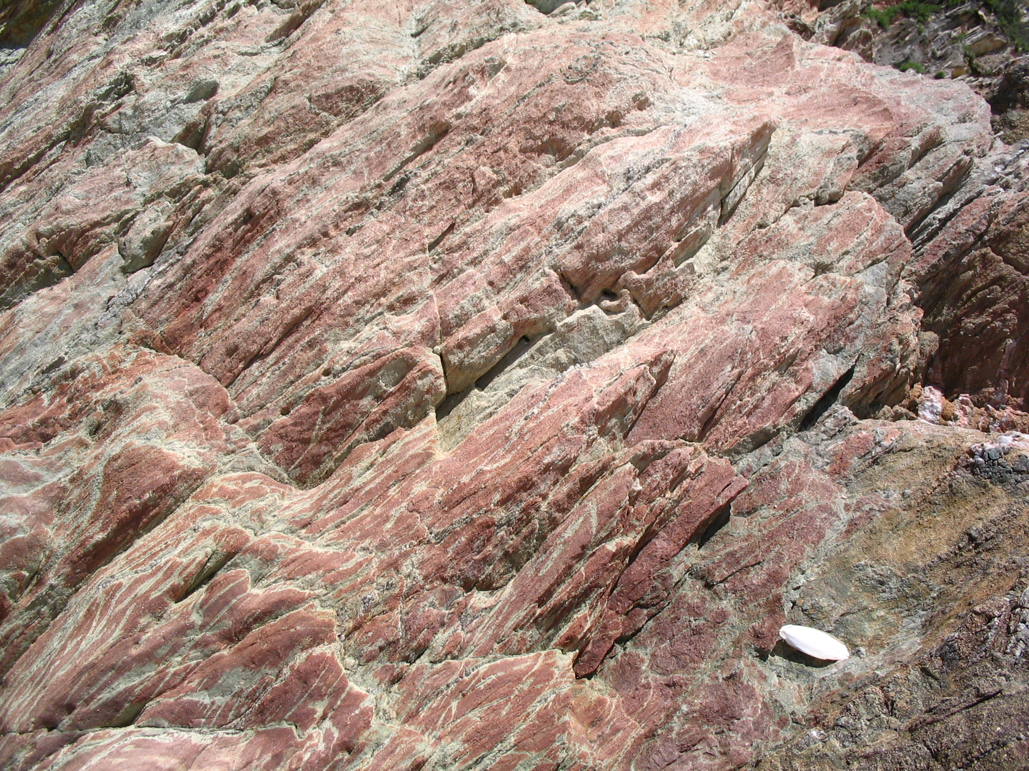 arkose, Bretignolles, F